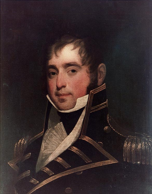 None